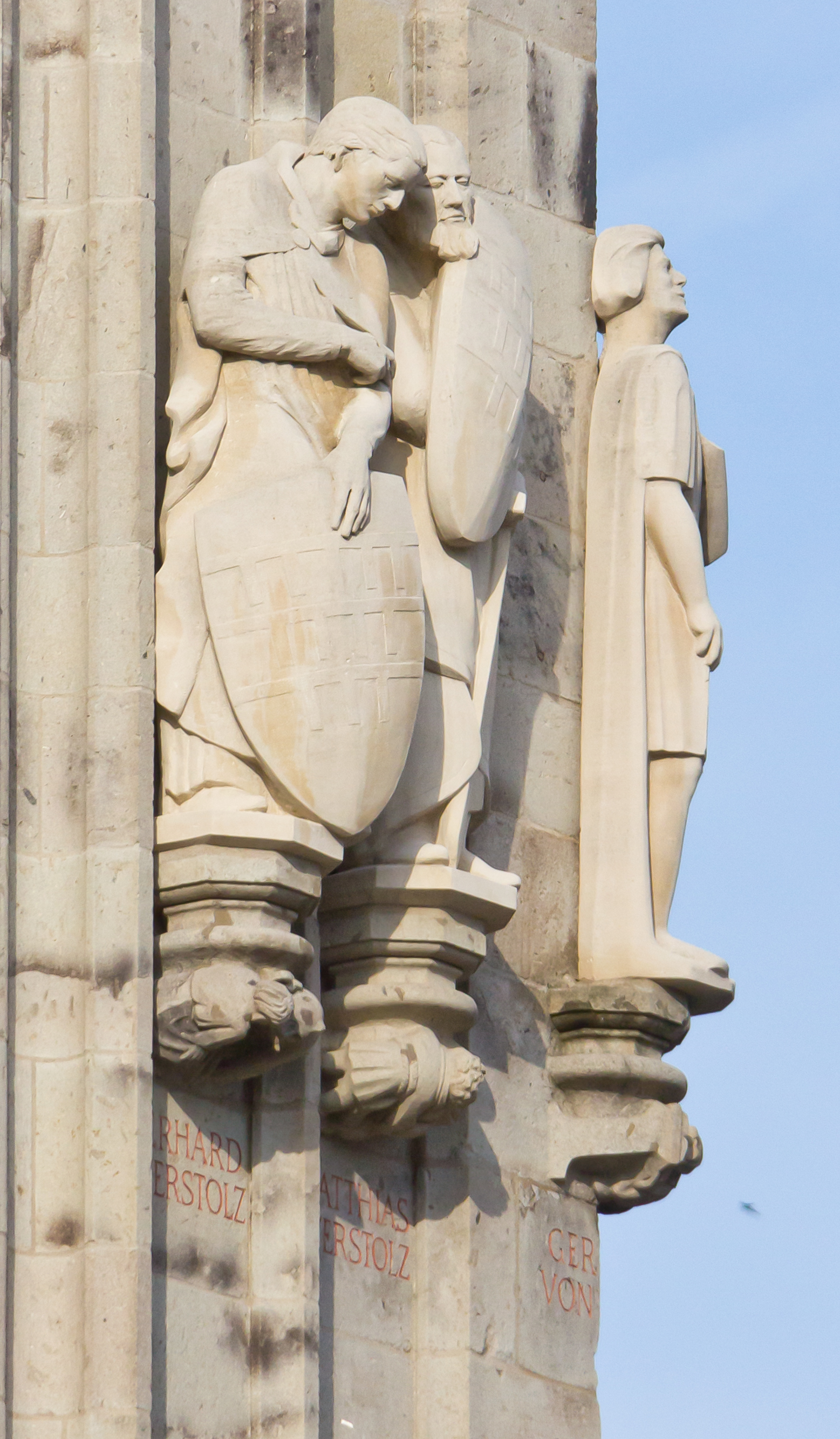 Rathausturm Köln - Gerhard Overstolz - Matthias Overstolz - Gerhard von Riele